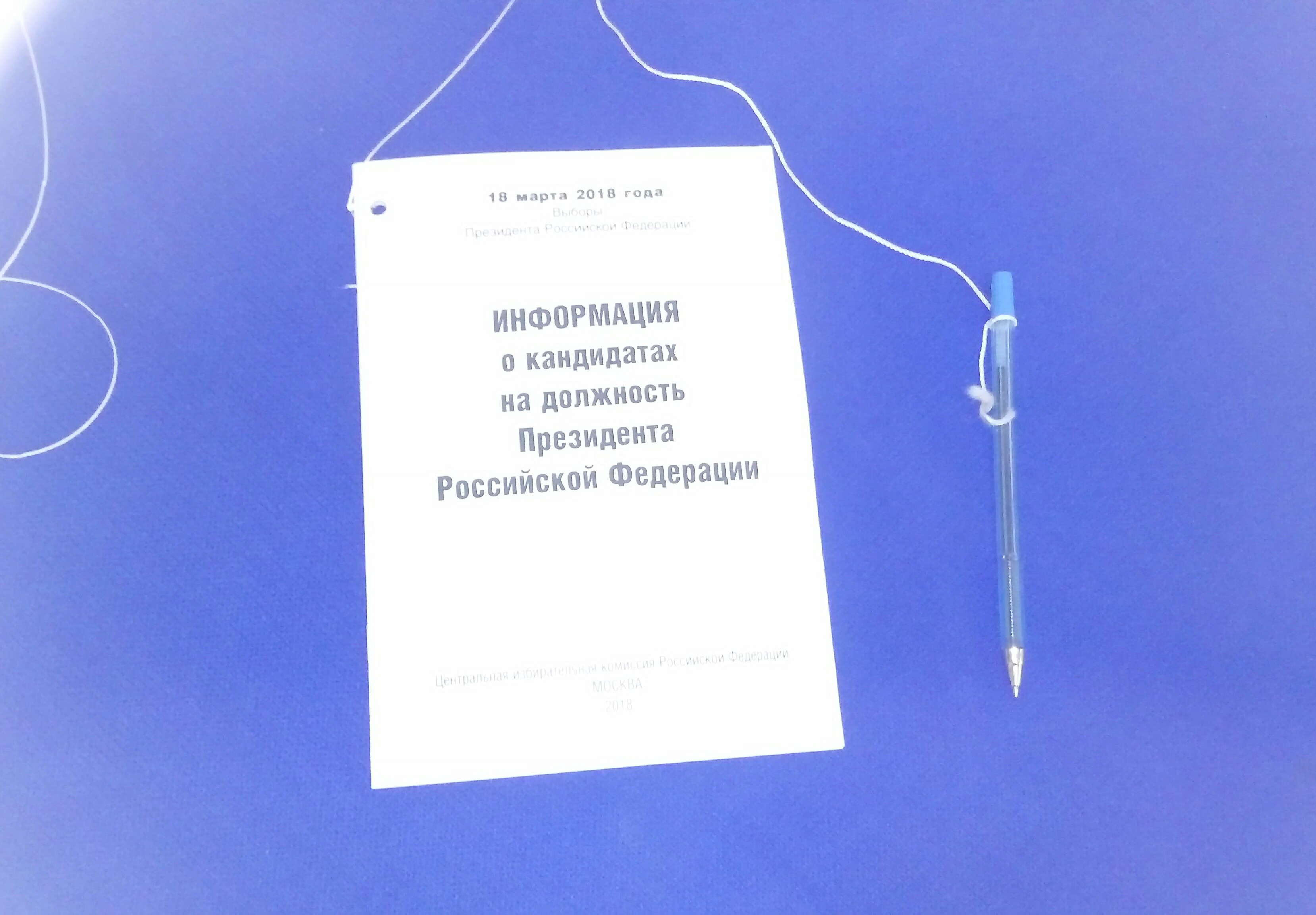 Книжка с данными о кандидатах (выборы 2018)